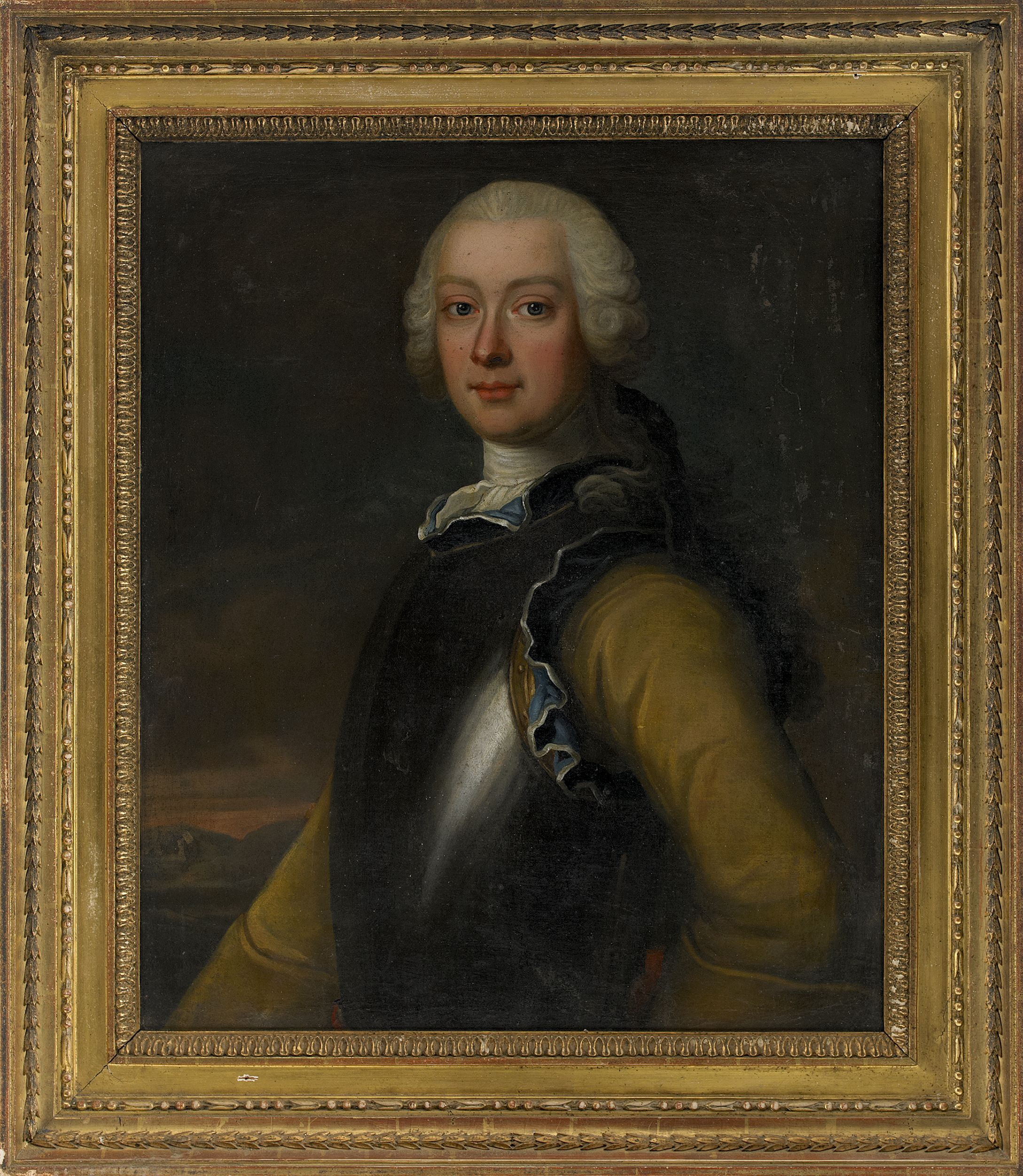 Friherre Georg Henrik Lybecker (1720-1776) klädd i uniform för Livregementet till häst med kyller och harnesk. Målning av Johan Stålbom (1712-1777). Proveniens: Forsby herrgård, Västra Eds socken, Kalmar län Överste Knut Bergenstråhle g.m. Ebba af Petersens deras dotter fröken Karin Bergenstråhle